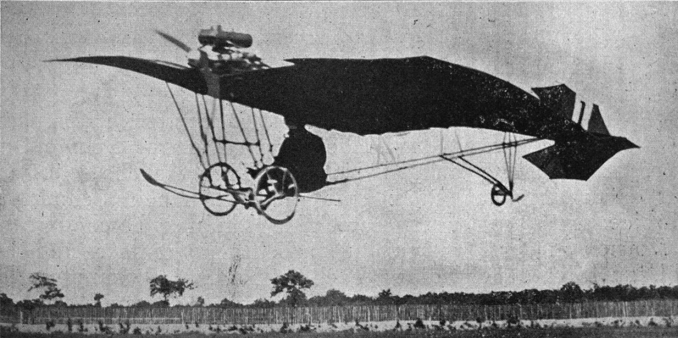 Edmond Audemars, Schweizer Radrennfahrer und Flugpionier